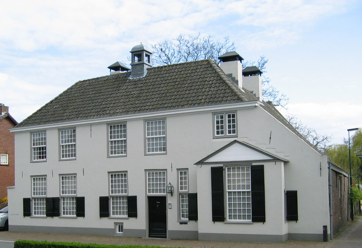 Son, Netherlands (NL), Dommelstraat 12